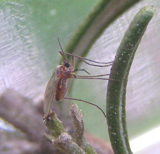 Asphondylia rosmarini, Cecydomyiidae. Imago issu de galles récoltées.